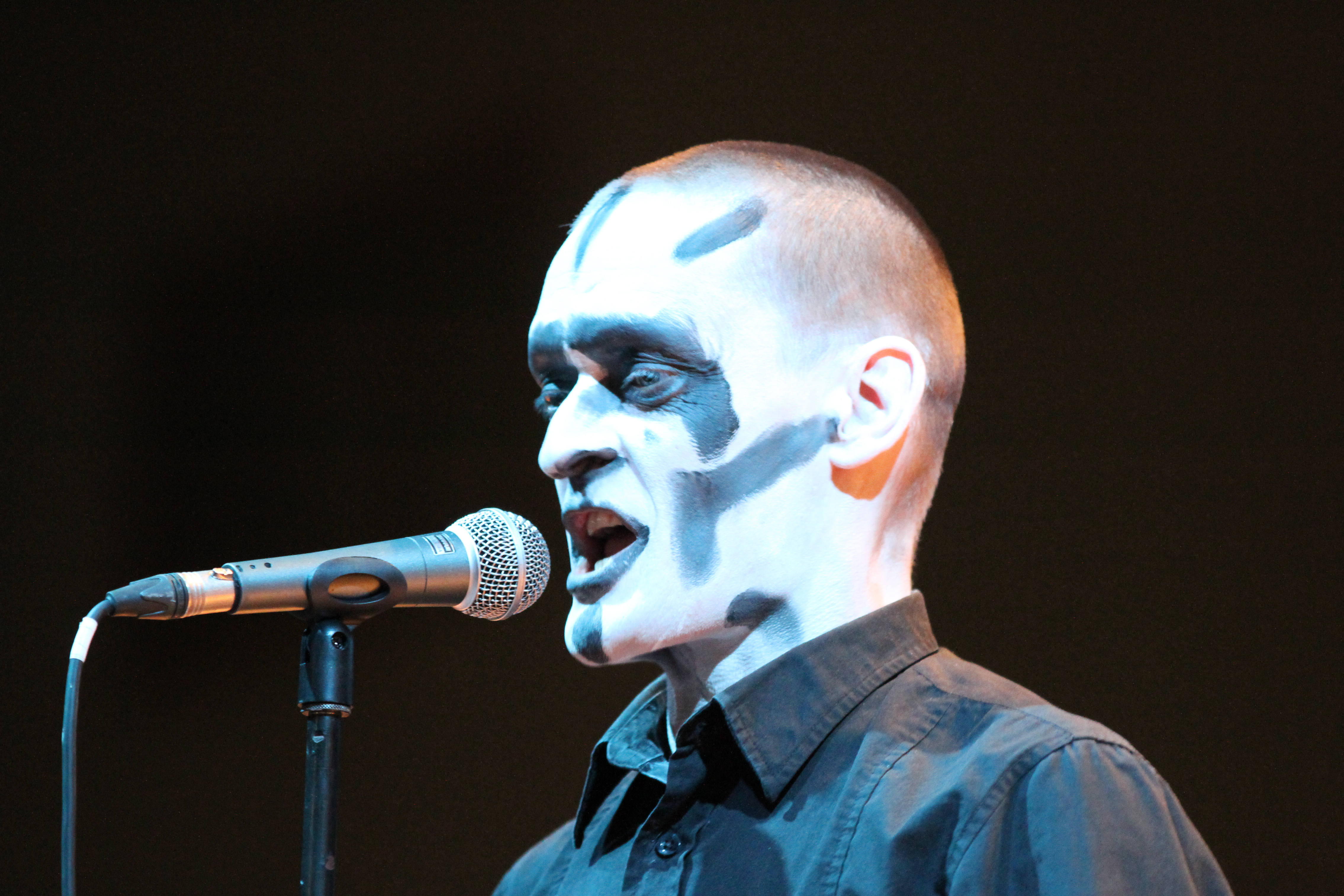 Stefan Ackermann von Das Ich auf dem Wave-Gotik-Treffen 2013 in der Agra-Halle.